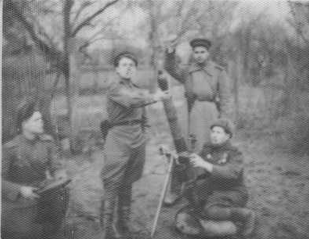 С боевыми товарищами. Весна 1944 года.